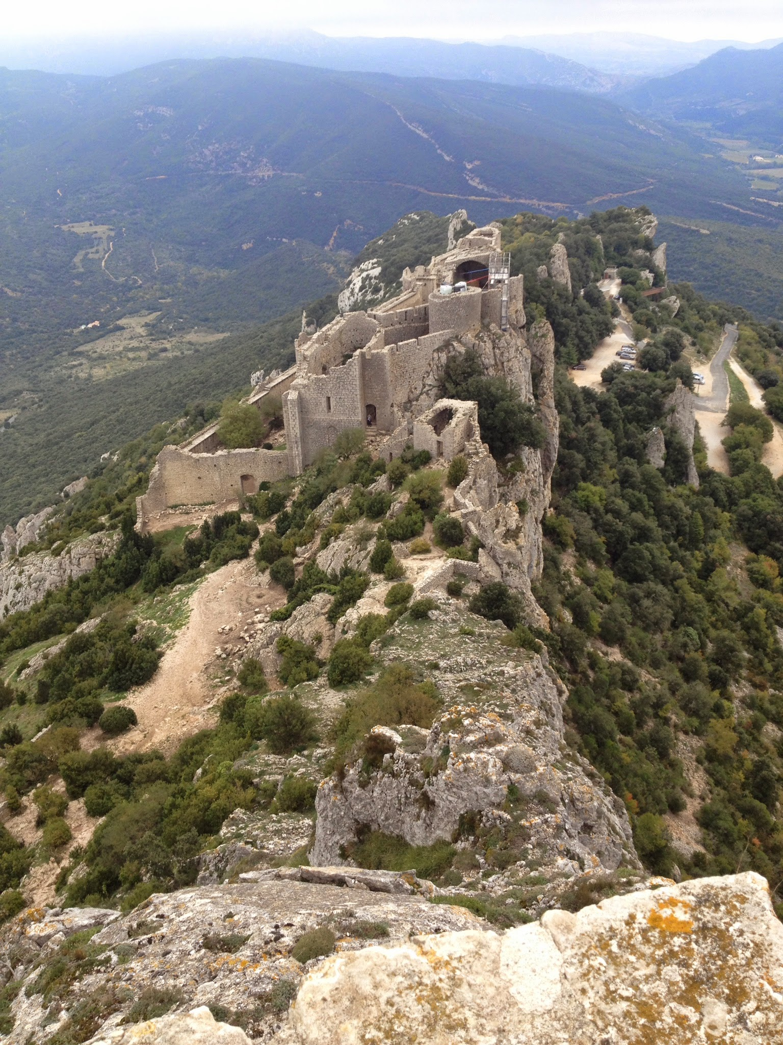 11350 Rouffiac-des-Corbières, France